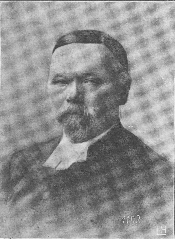 Description